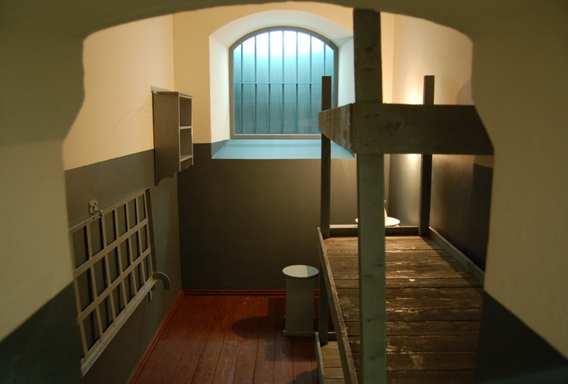 Rekonstruktion einer Viermannzelle zu Zeiten des Speziallagers Bautzen